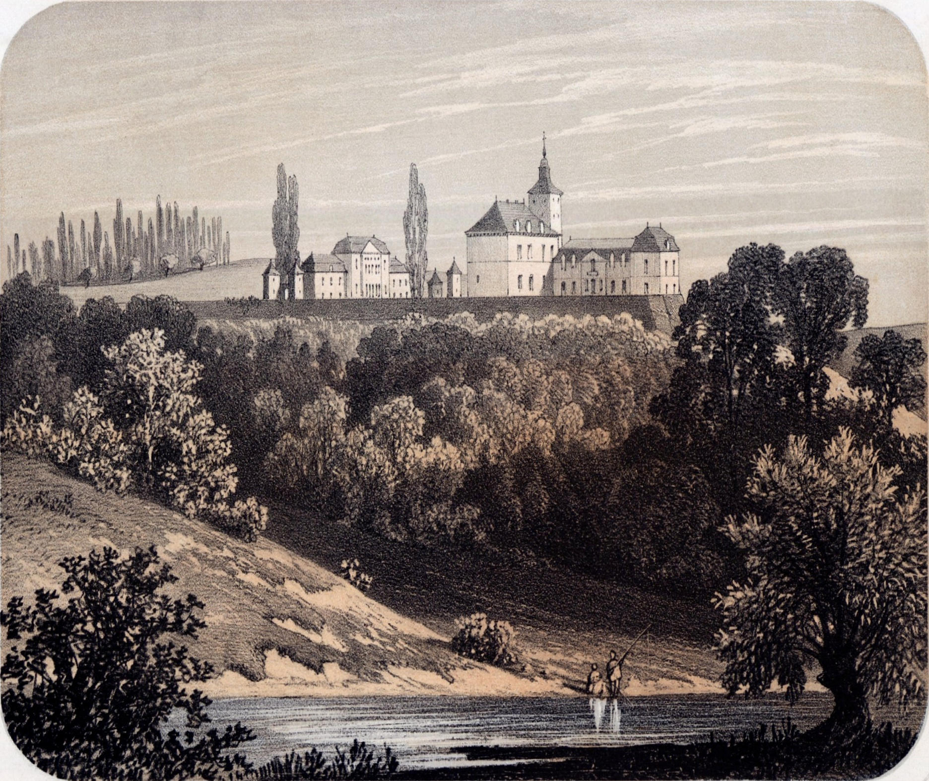 Lithografie des Schlosses Haultepenne in Gleixhe bei Flémalle, Belgien